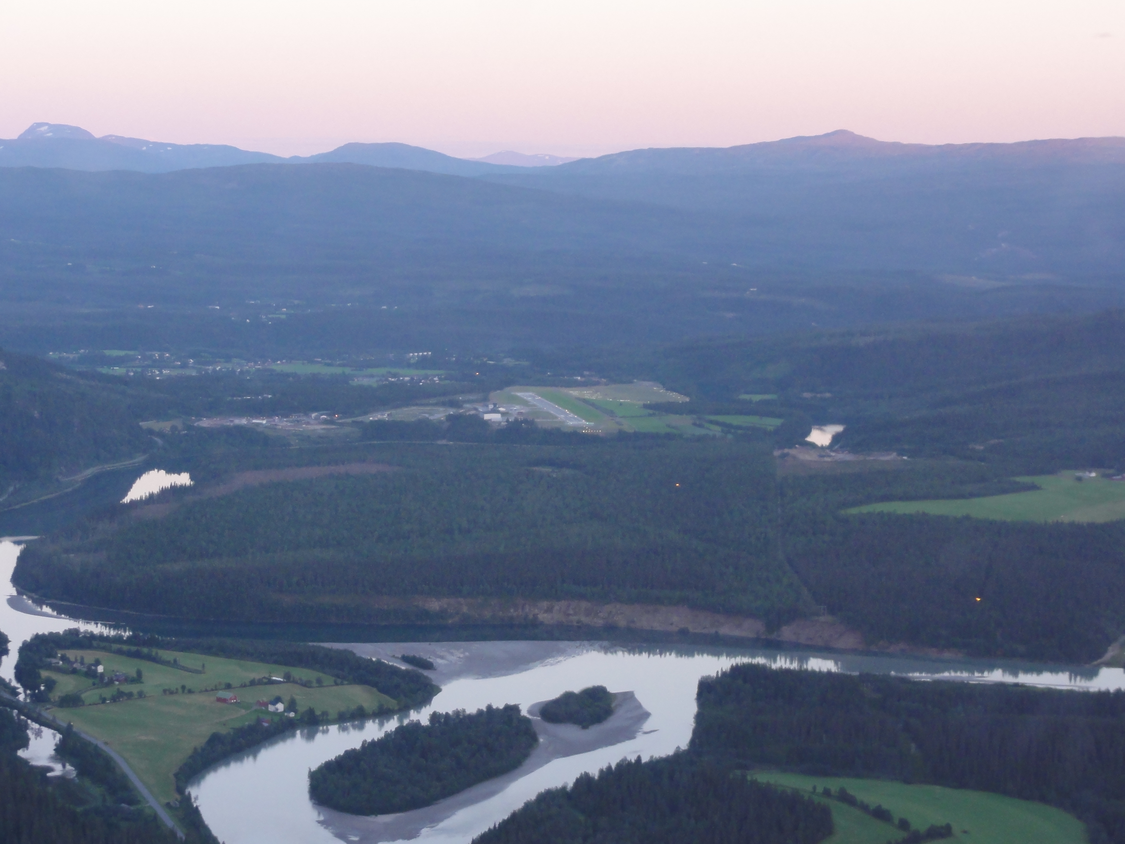 Mo i Rana lufthavn, Røsvoll i senter av bildet. I forgrunnen sees Røvassåga inn fra venstre som møter Langvassåga. Samløpet av de to elvene skjer rett før utløpet i Langvatnet.